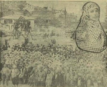 Türkiye'nin ilk kadın muhtarı Gül Esin ve seçimi yapan halk.